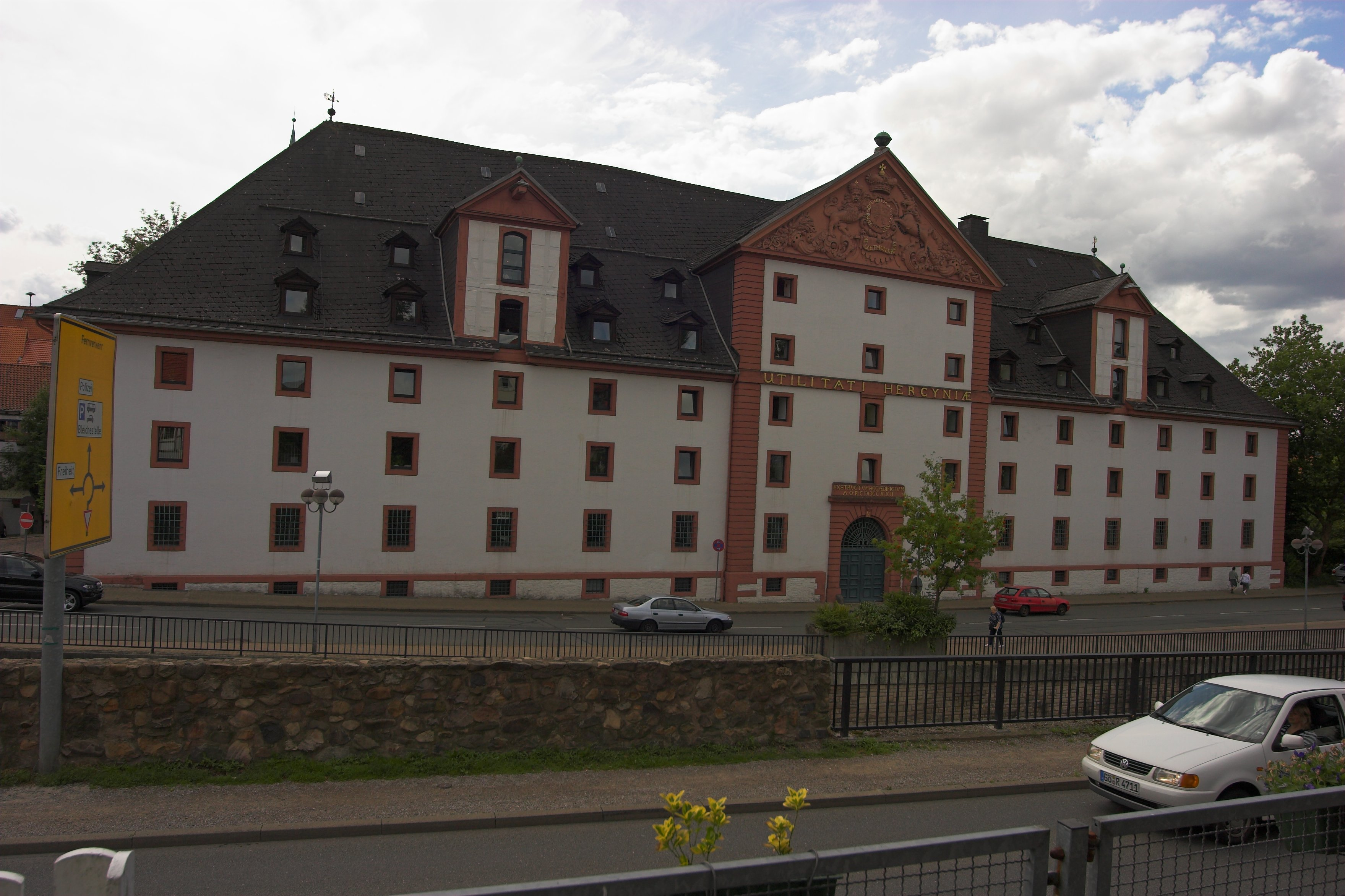 Ehemaliges Kornmagazin und heutiges Rathaus von Osterode (Harz)